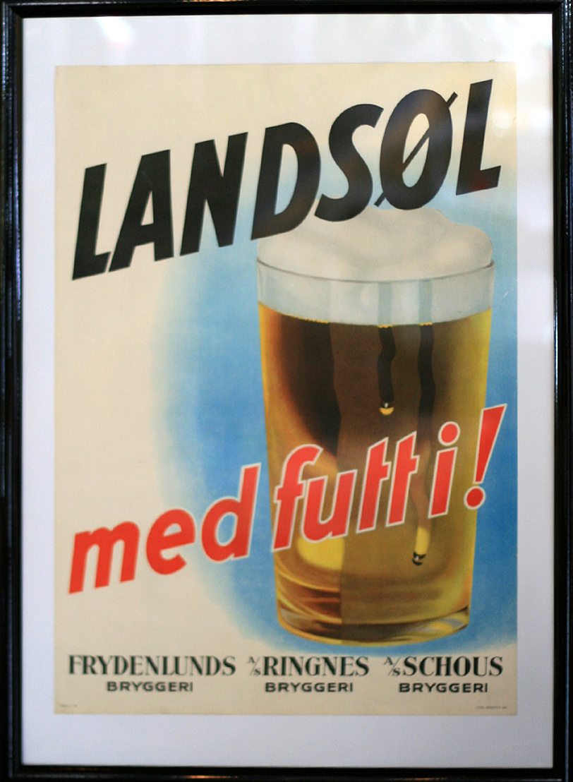 Reklameplakat for landsøl.